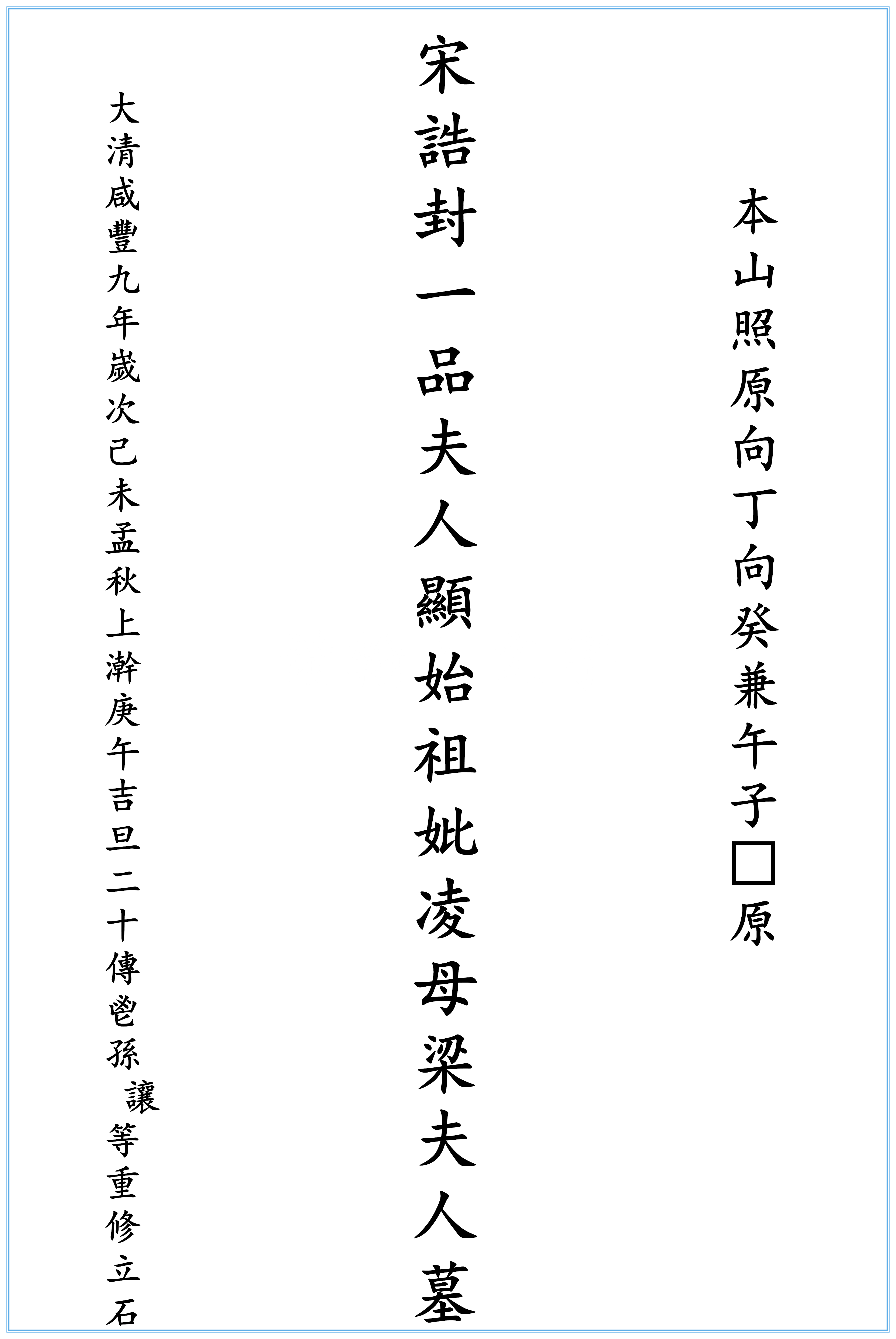 中文（中国大陆）: 梁氏一品夫人墓墓碑。